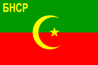 Флаг Бухары (вариация с 23 сентября 1921 по 11 октября 1923 года